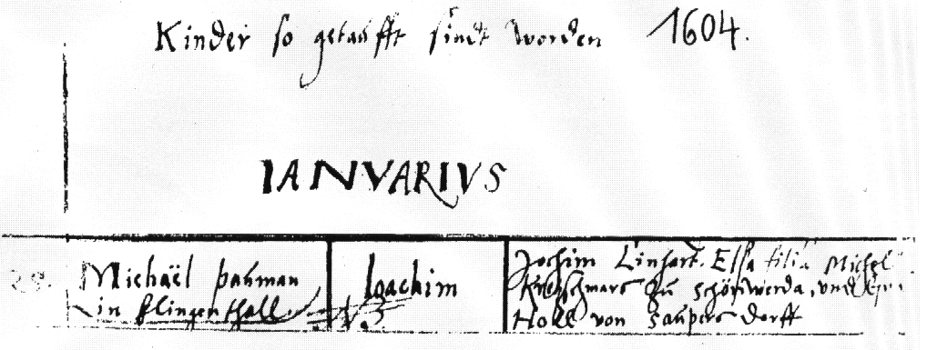 die erste Erwähnung des Namen "Klingenthall" vom Jahre 1604 im Schönecker Kirchenbuch, Public Domain